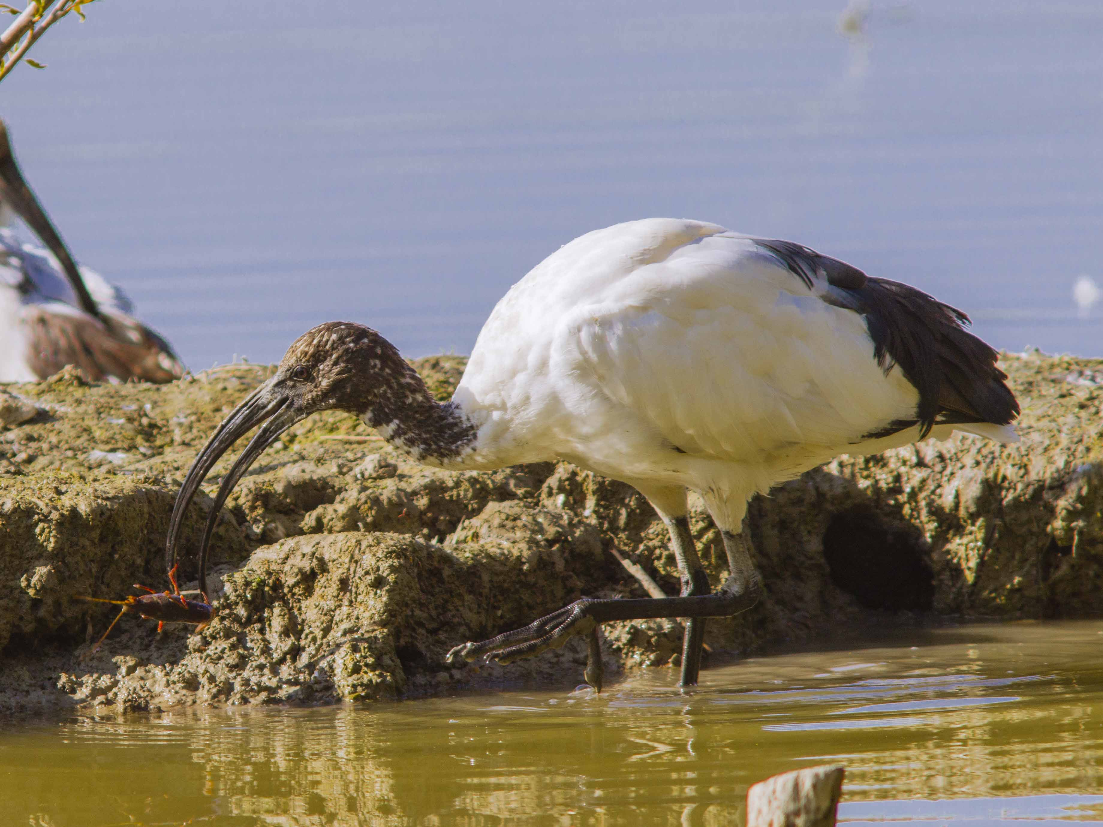 Aree delle risorgive di Viarolo, Bacini di Torrile, Fascia golenale del Po (Q55441768)